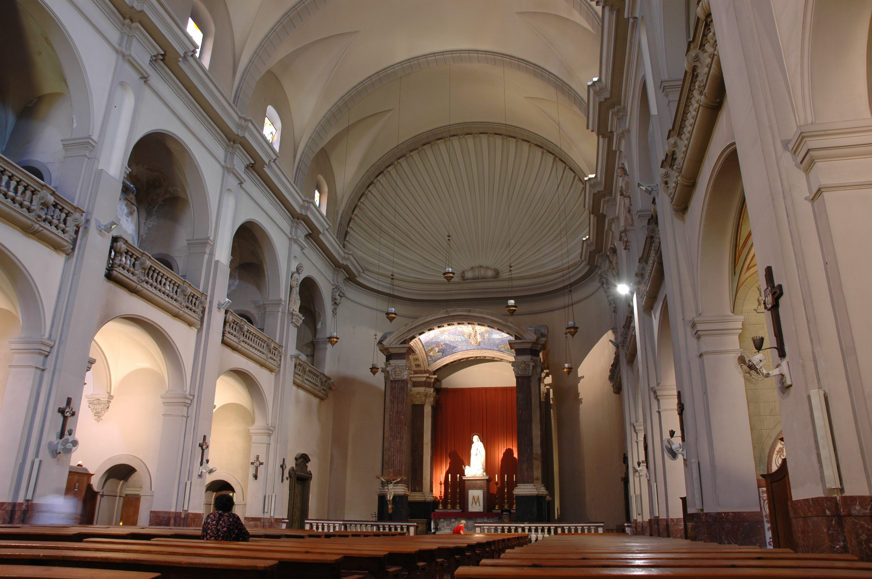 Església de Betlem - Interior